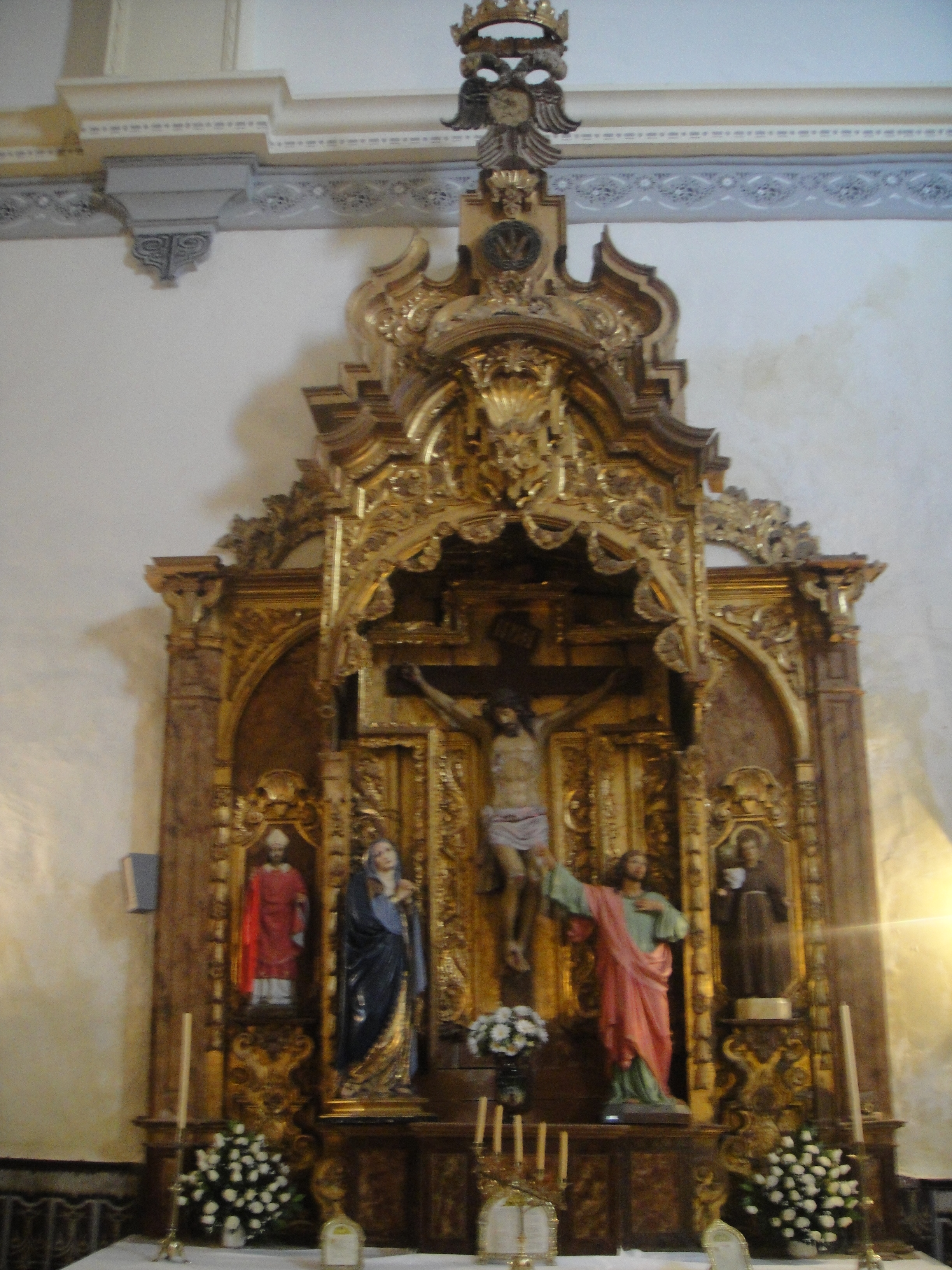 Retablo de Cristo Crucificado en la iglesia de San Francisco de Fuente Obejuna, provincia de Córdoba, (España).